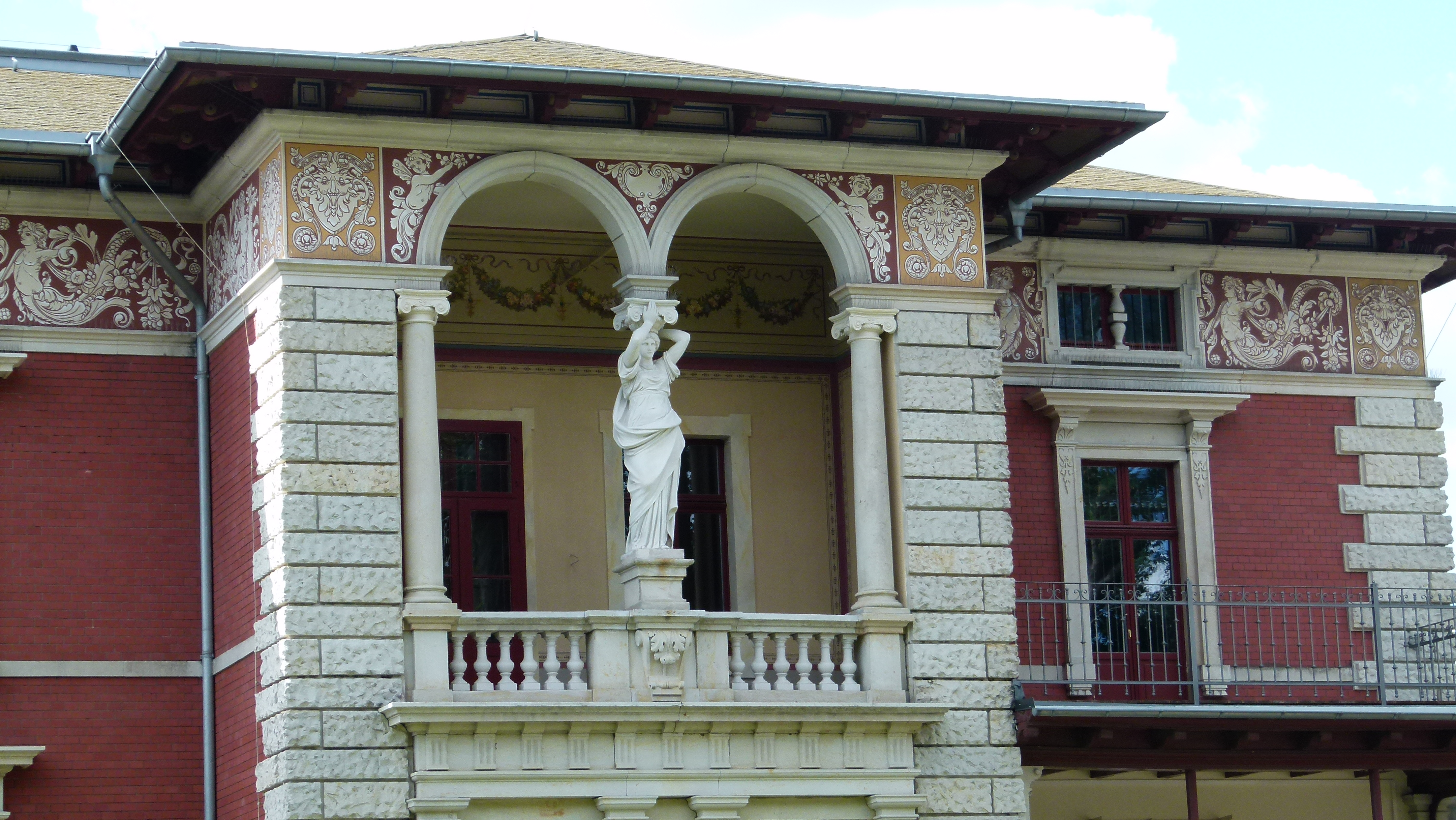 Denkmalgeschütztes Haus, Meißner Straße 47, Radebeul, Sachsen